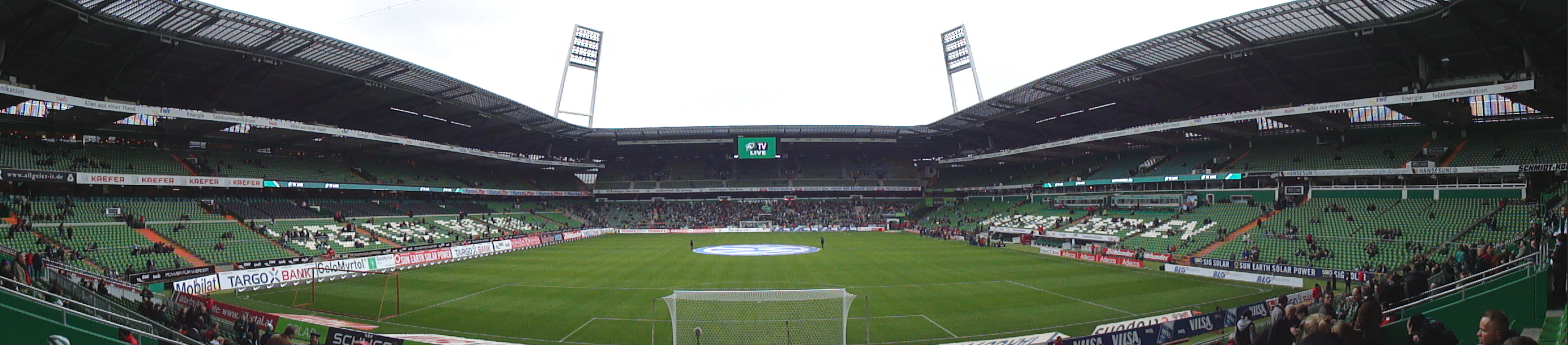 Innenansicht des Weserstadions mit Blick auf die Osttribüne